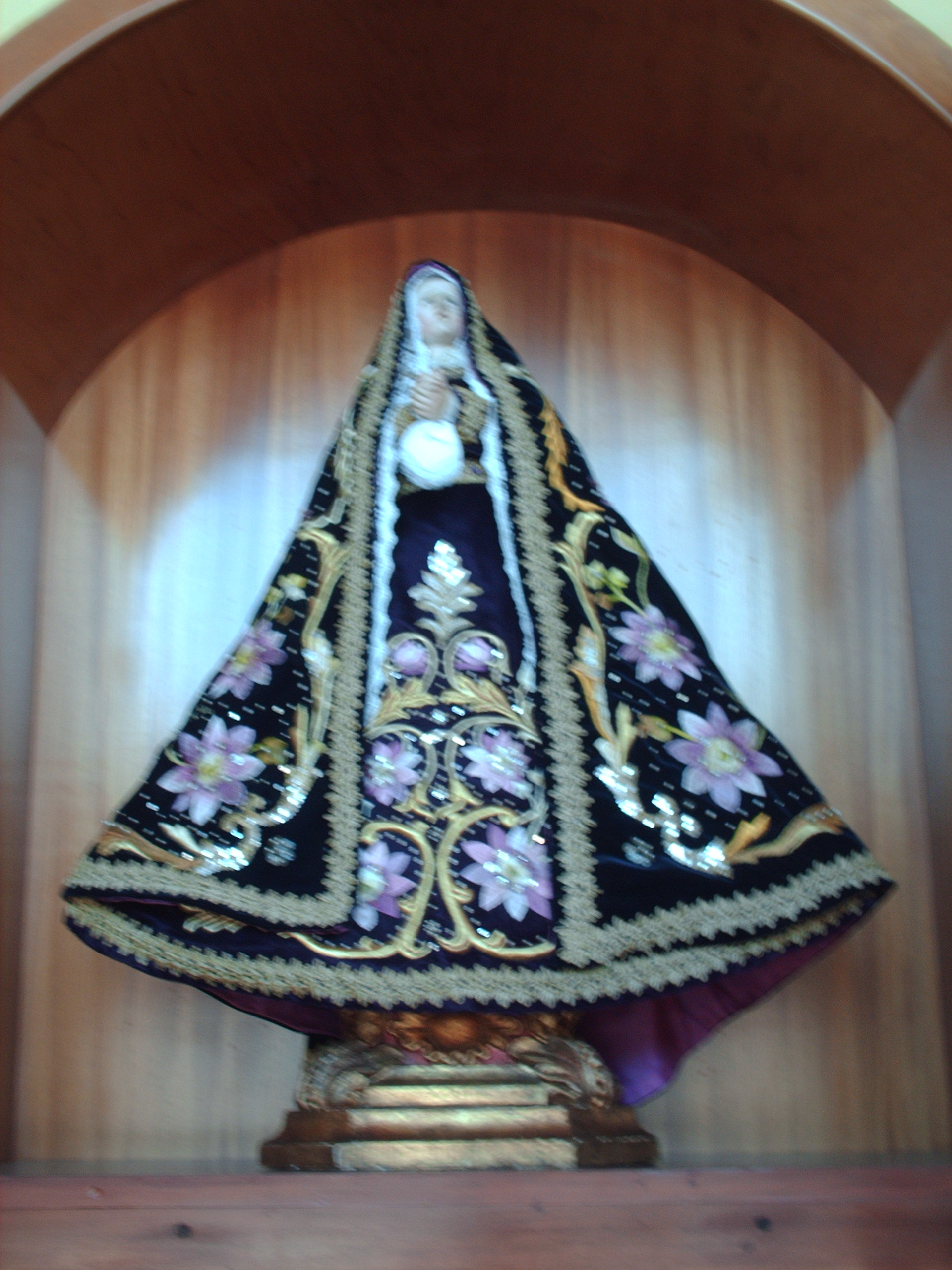 Virgen de Nuestra Señora de los Dolores de Villas del Sol,imagen venerada en la capilla del mismo nombre ubicada en la ciudad de Querétaro México.